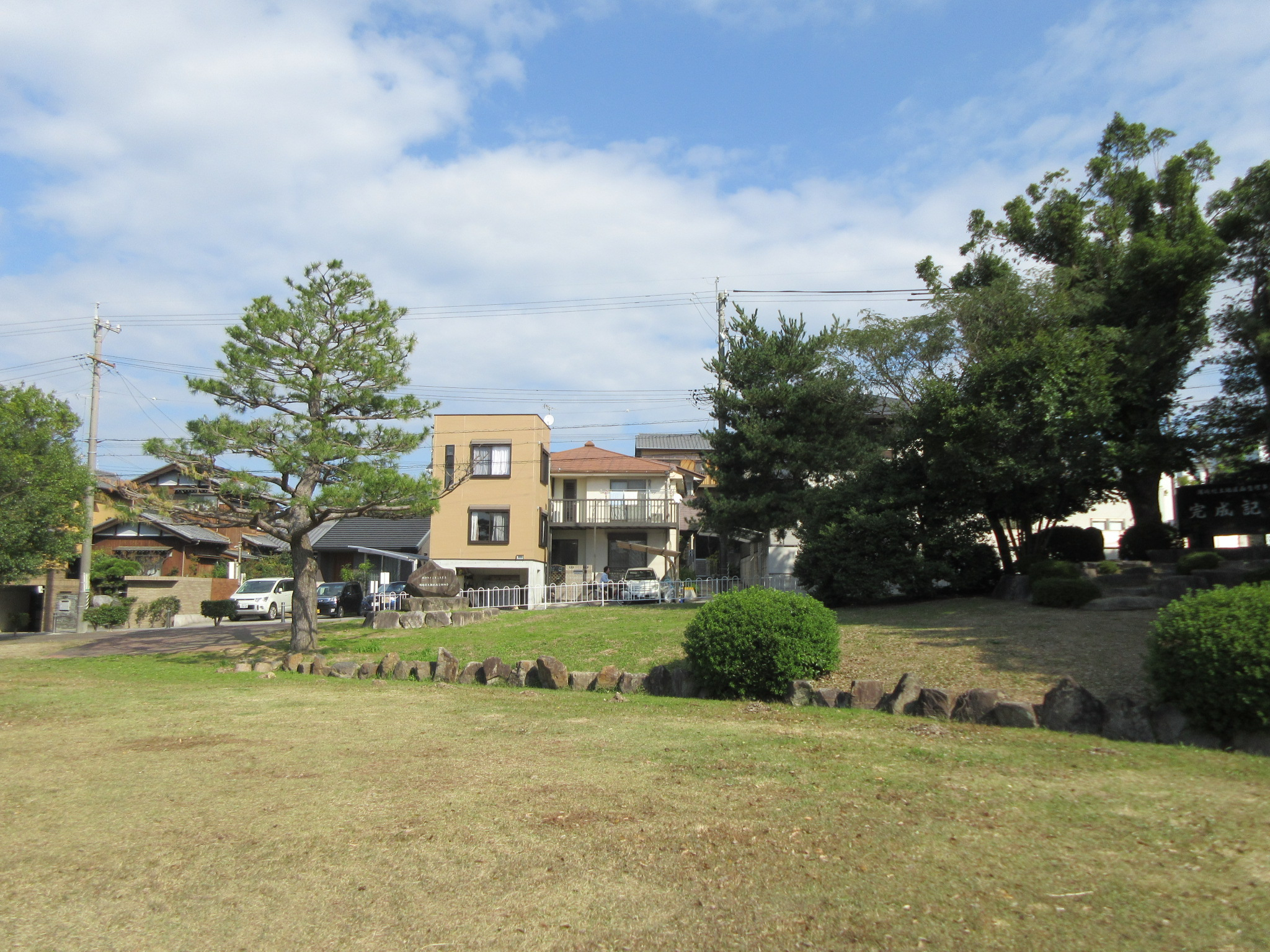 庄司田公園（岡崎市庄司田1丁目）